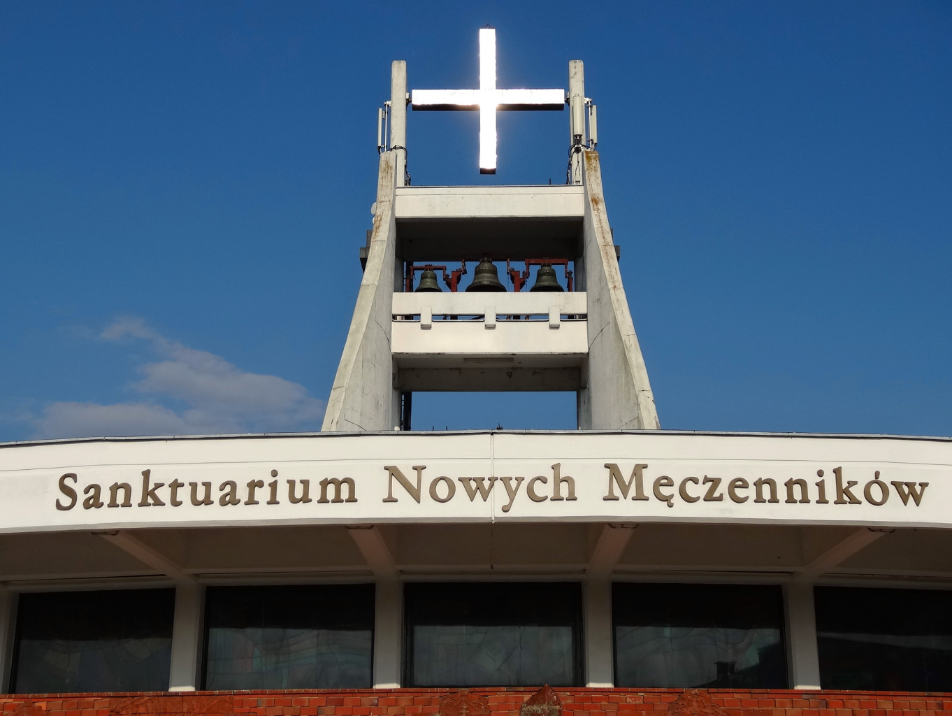 Kościół p.w. Świętych Polskich Braci Męczenników w Bydgoszczy na osiedlu Wyżyny, Sanktuarium Nowych Męczenników